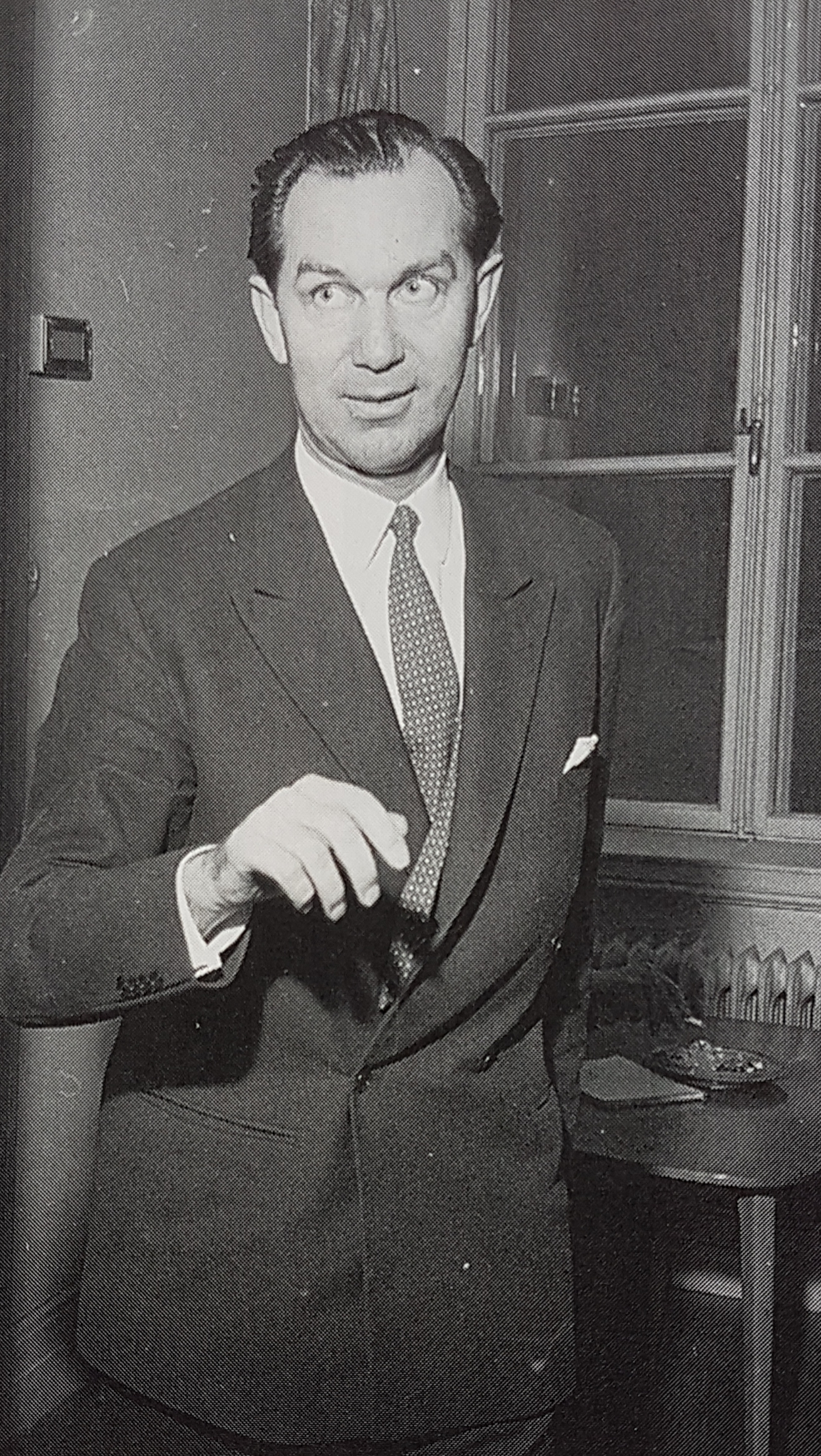 Göte Lindgren Pilotförenigens ombudsman